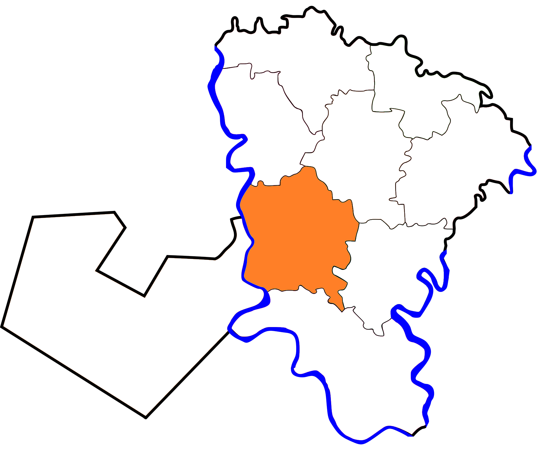 خريطة مركز منوف بالنسبة لمحافظة المنوفية، مصر.